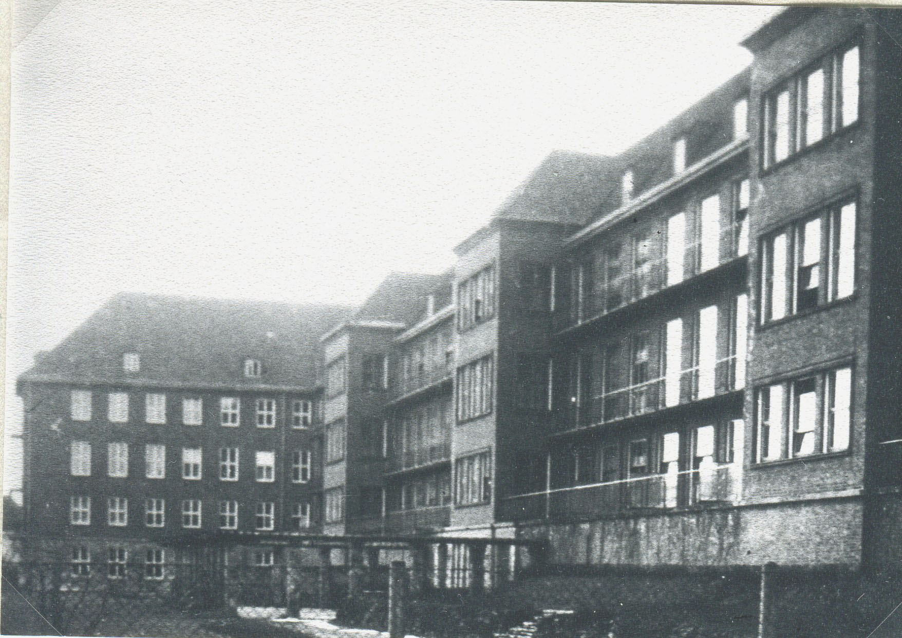 Marinelazarett der Kriegsmarine in Lehe (Bremerhaven).